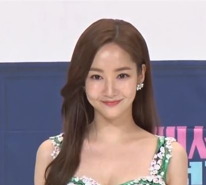 디스패치 구독 클릭! Dispatch Subscribe